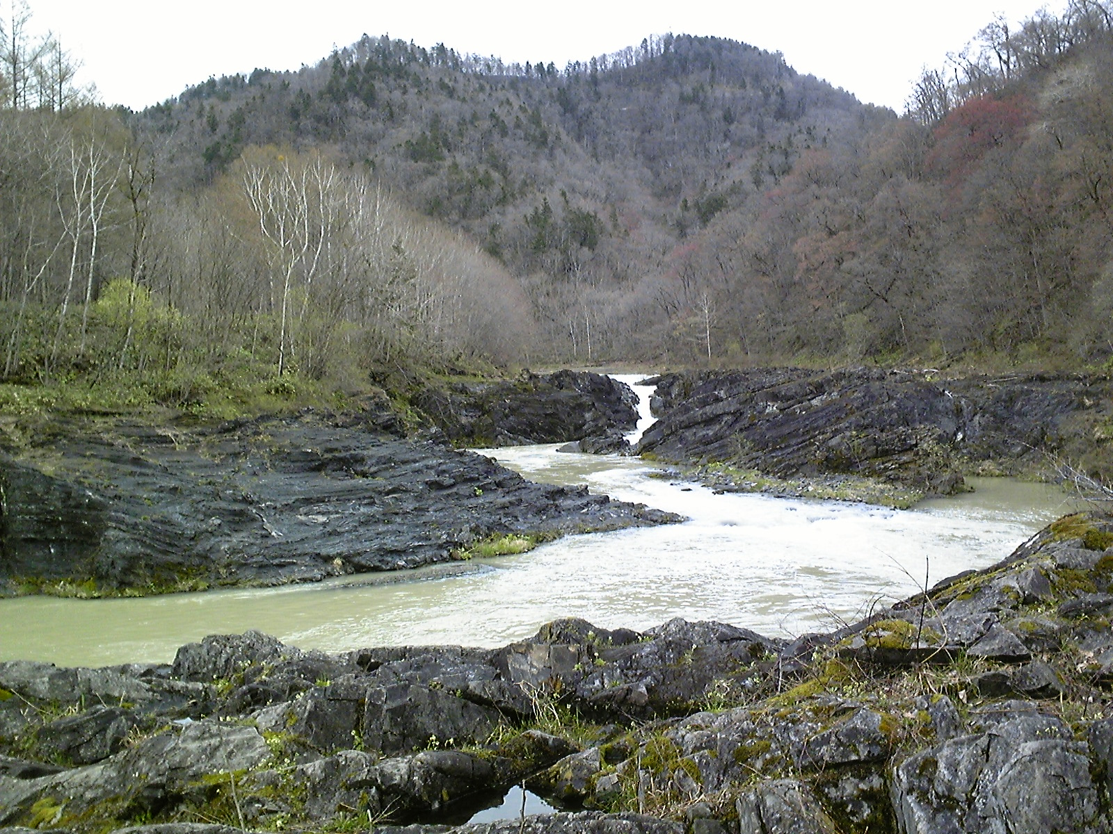 北海道芦別市 空知川にかかる空知大滝